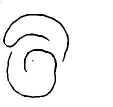 Skizze der Hünenburg im Barbruch von Wilhelm Tappe, 1822